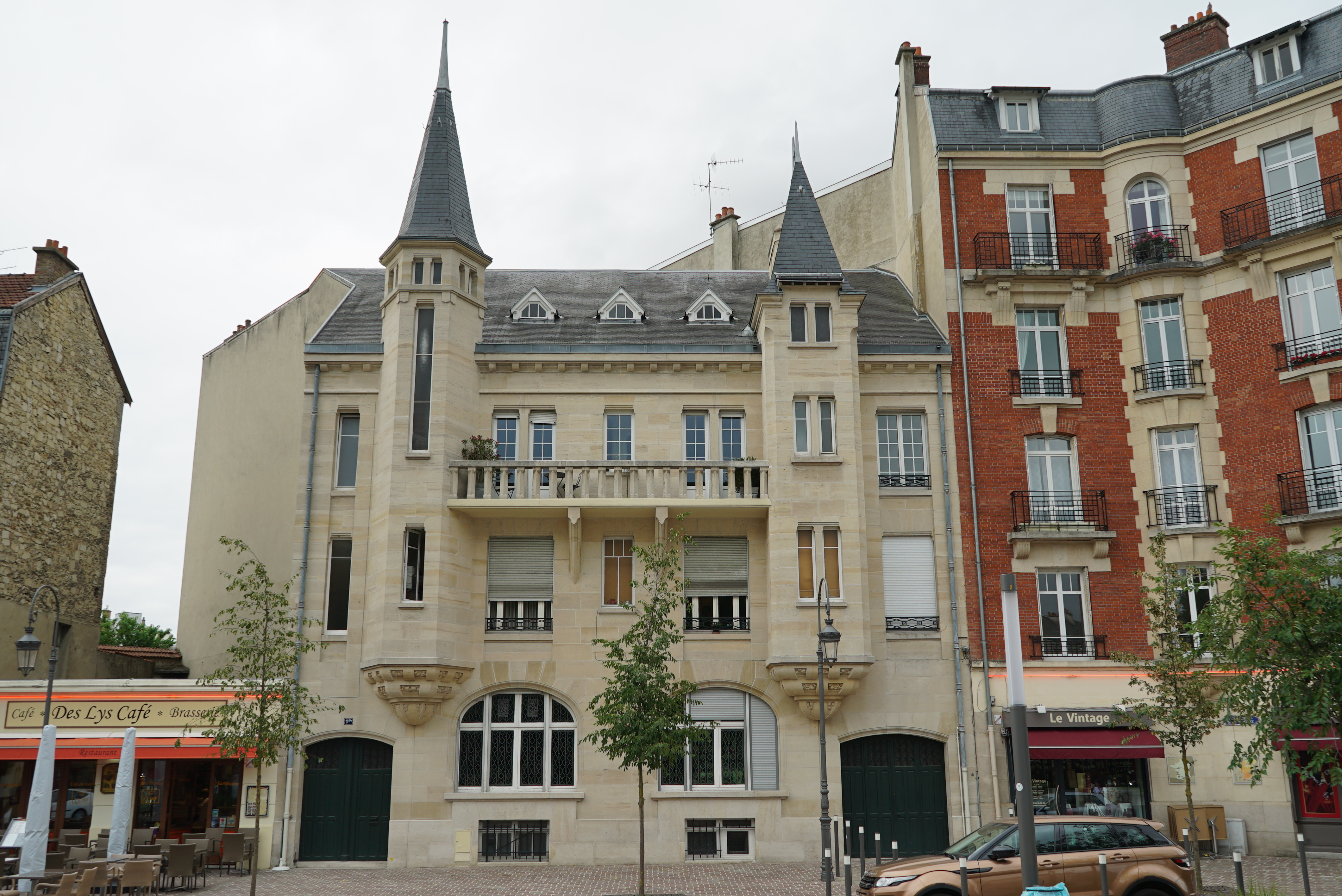 immeubles place des Martyrs de la Résistance, pour la famille Lallement par l'architecte André Ragot et Jacques Simon maître verrier.